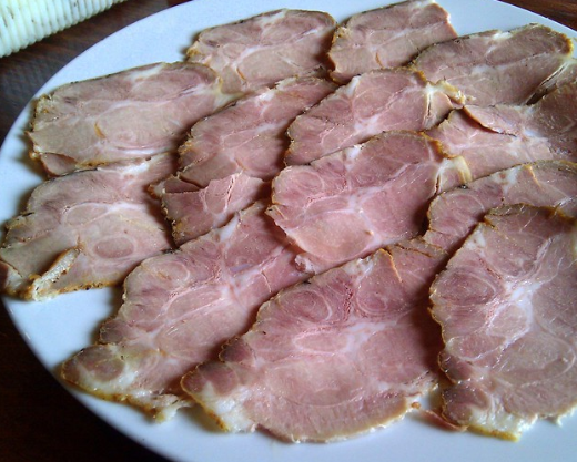 Plat de carn "mechada" ja tallada